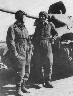 Влади́мир Петро́вич Ха́зов — (9 сентября 1918, село Лава ныне Сурского района Ульяновской области — 13 сентября 1942, Сталинград) — советский офицер, танкист-ас, участник Великой Отечественной войны, Герой Советского Союза, старший лейтенант.